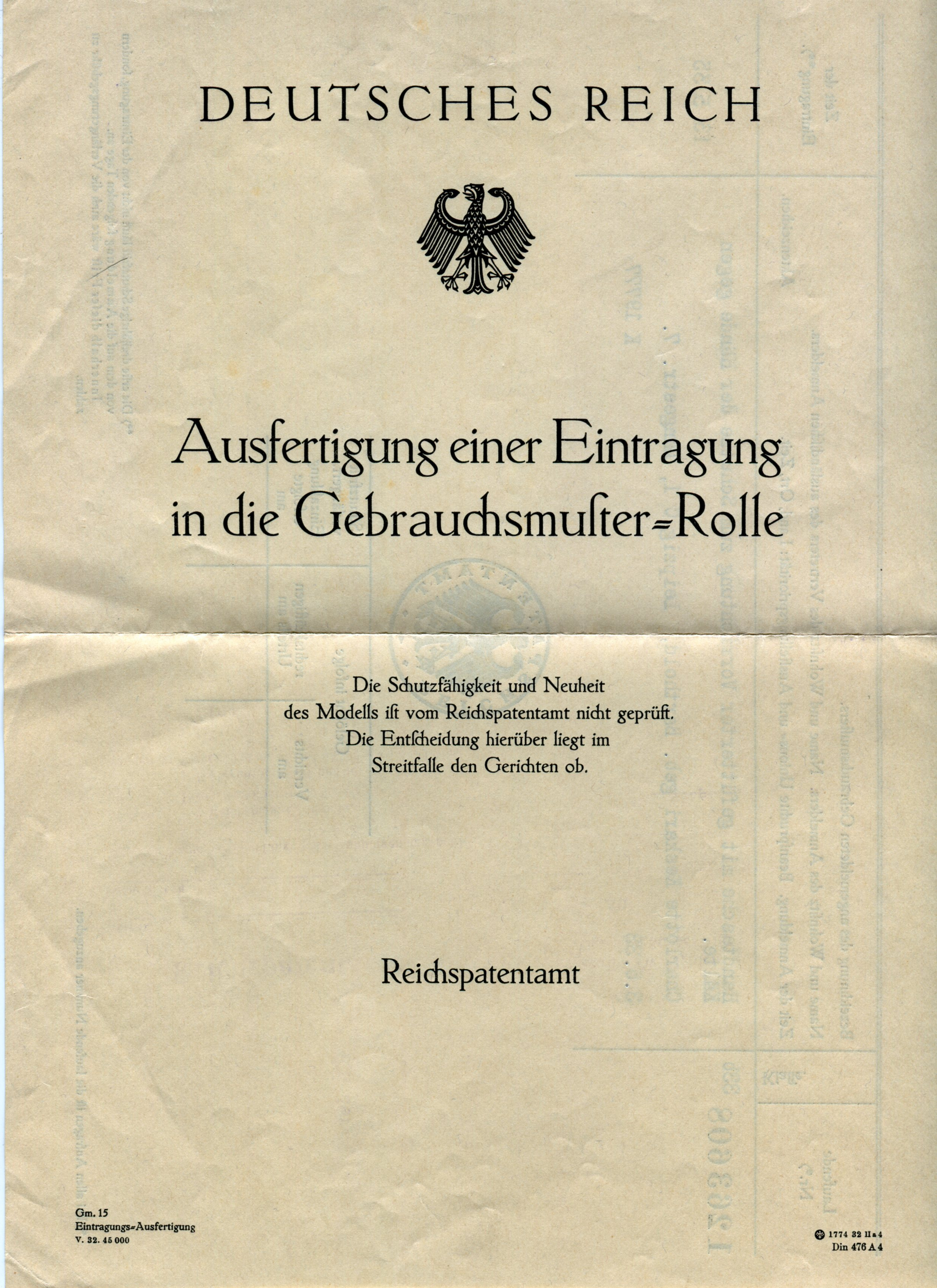 Ausfertigung einer Eintragung in die Gebrauchsmuster-Rolle. Titelseite